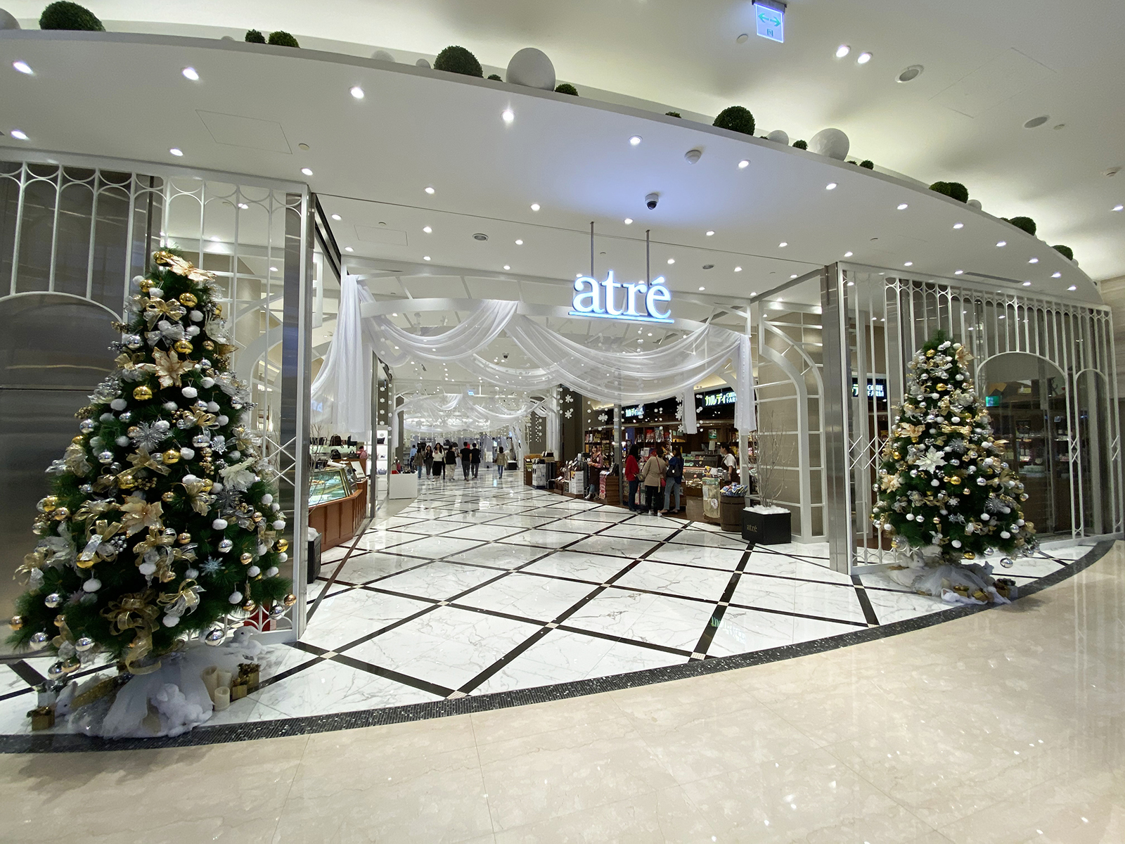 Breeze NAN SHAN Level 2 arte